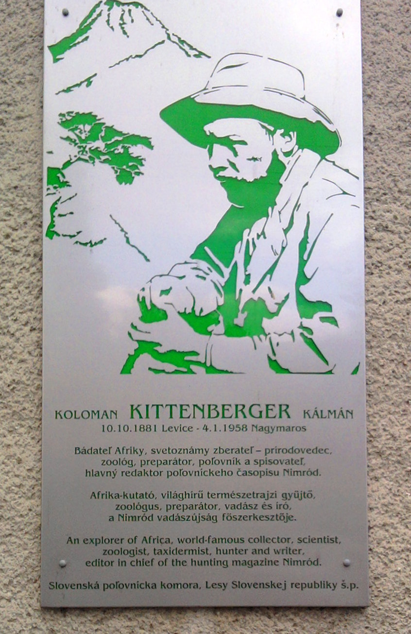 Kittenberger Kálmán emléktáblája a lévai erdészhivatal falán, felavatva születésének 130. évfordulóján, Léva, Koháry utca